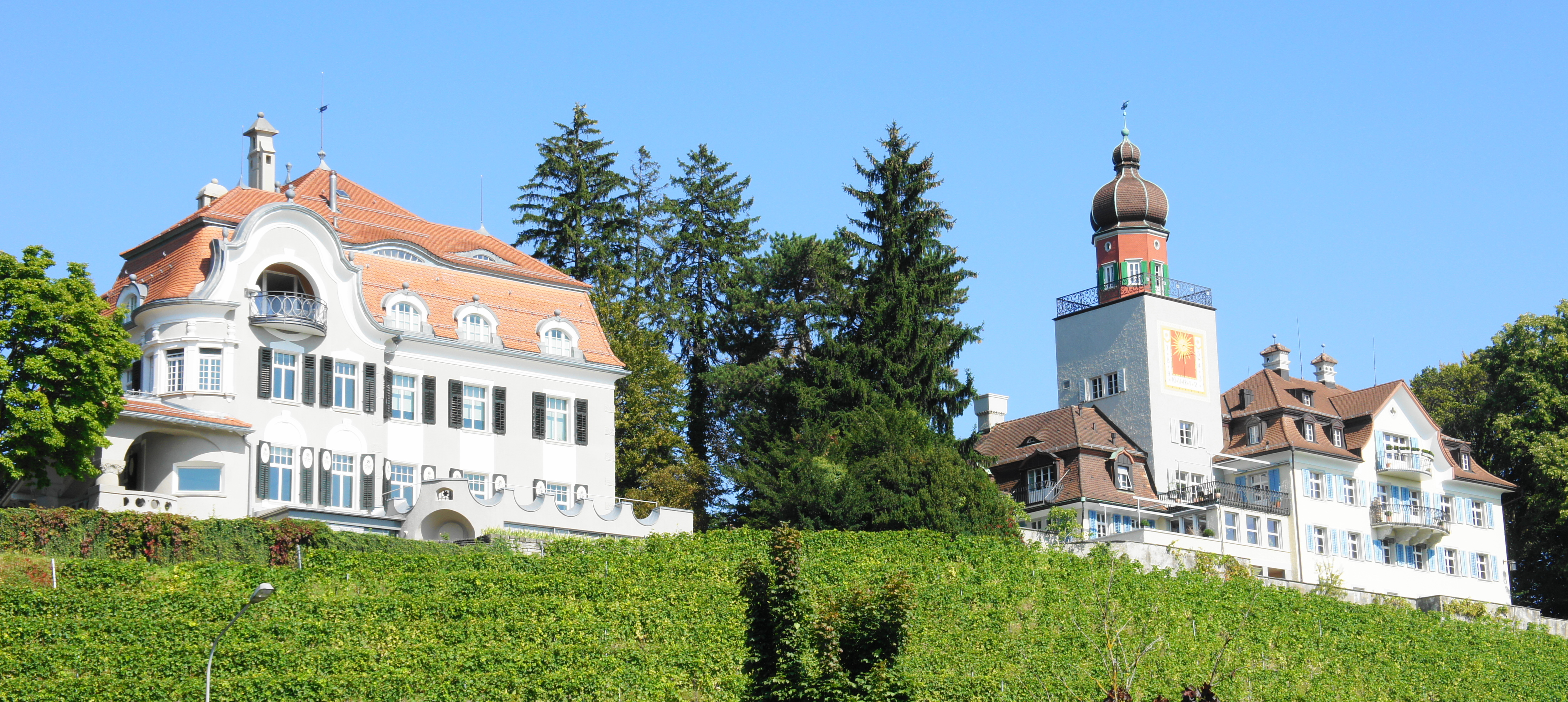 Jugendstilvilla, Schlossstrasse 211, in Balgach (links) Schloss Heerbrugg, Schlossstrasse 209, in Balgach (rechts)